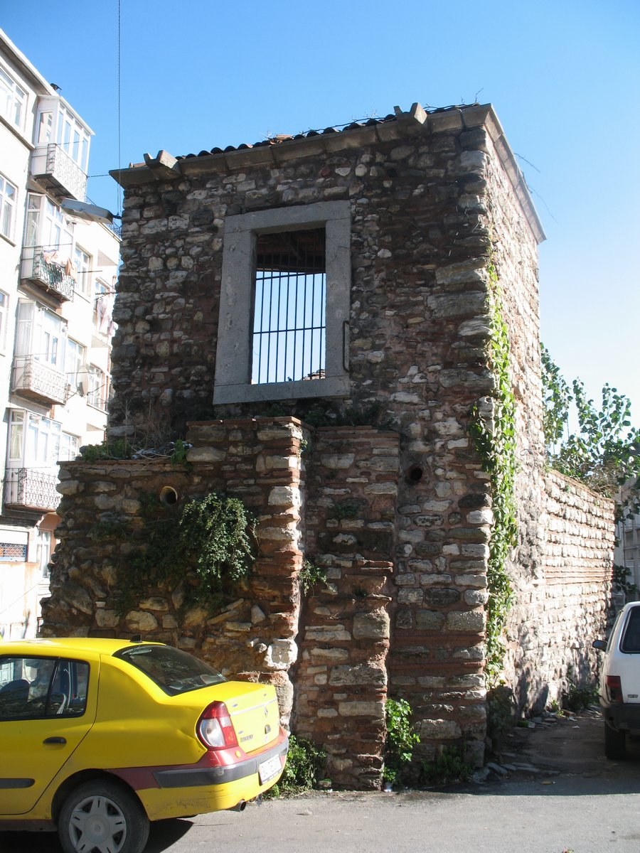 Valens Aqueduct in Constantinople.